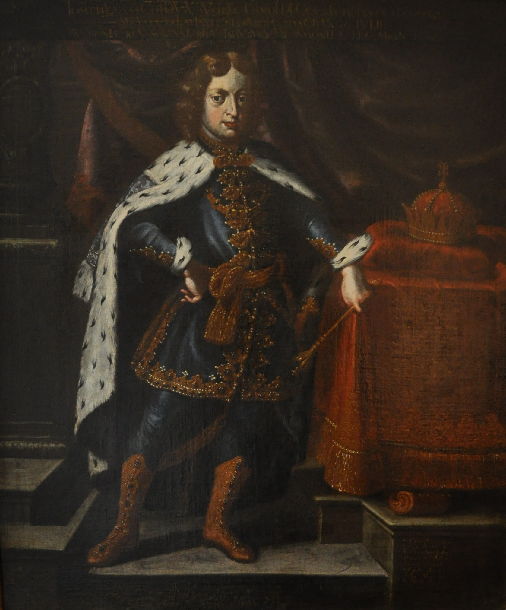 König Joseph von Ungarn (1678–1711), der spätere Kaiser Joseph I